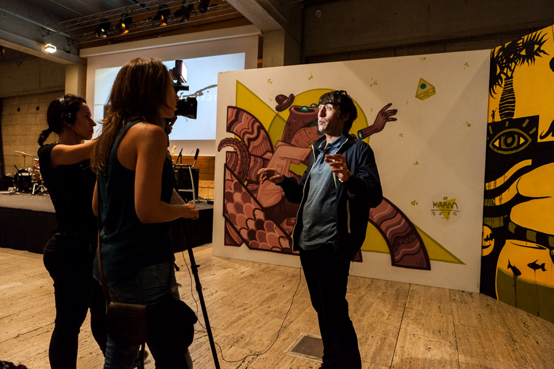 Foto del artista Fasim hablando con los periodistas de BTV en la entrega de los premios Cuixart en el CCCB de Barcelona, 2015.